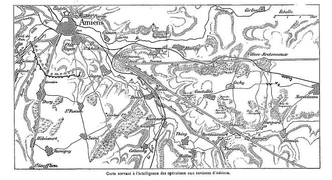 Carte des environs d'Amiens